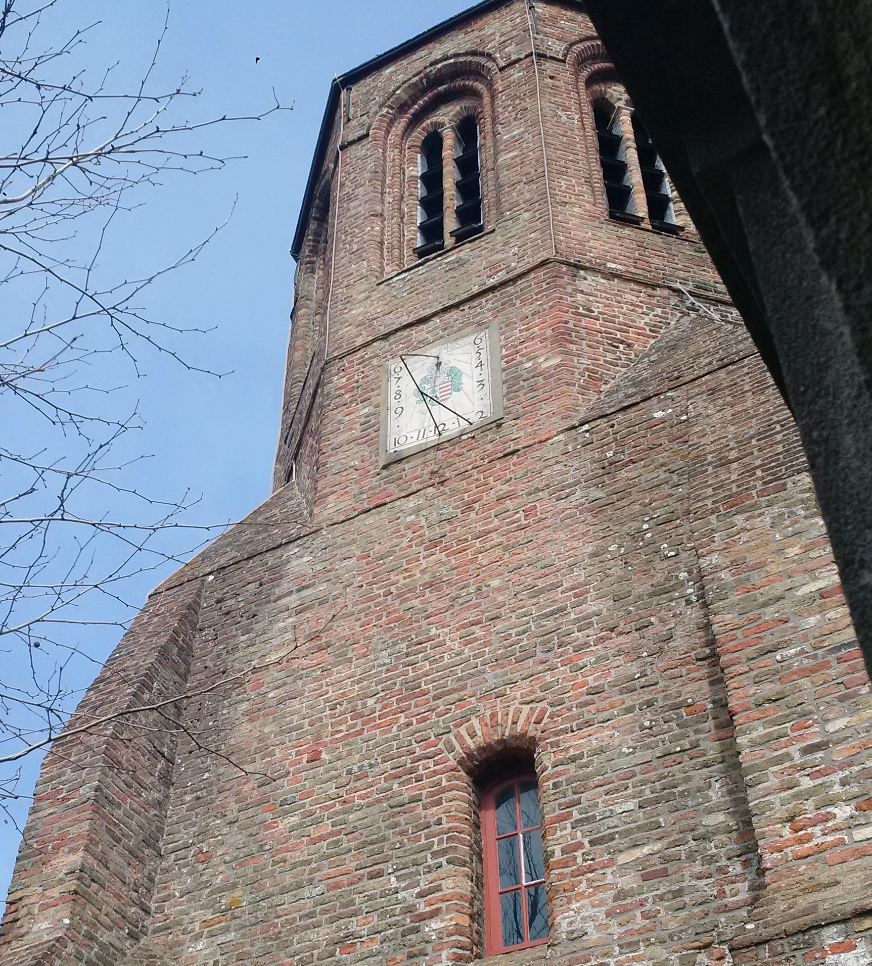 Op de oude toren van de St. Margarethakerk te Knokke is een poolstijlzonnewijzer bevestigd van het verticale type. Metselaar Matthues Scheefer plaatste in 1648 "een sonnewijzer aenden muer van de kercke". Het was een geschenk van Marc Albert Arrazola de Oñate, burgemeester van het Brugse Vrije en de hoofdman-herstichter van de Sint-Sebastiaansgilde.